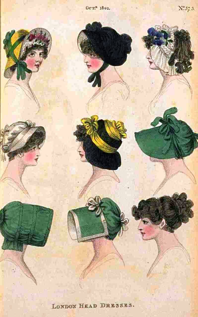 Das Modekupfer aus dem Jahre 1802 zeigt das Übergangsstadium von der Rokokohaube zur Schute.